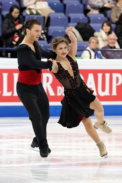 Кавита Лоренц / Панагиотис Политцвакис (Германия) на чемпионате мира 2017